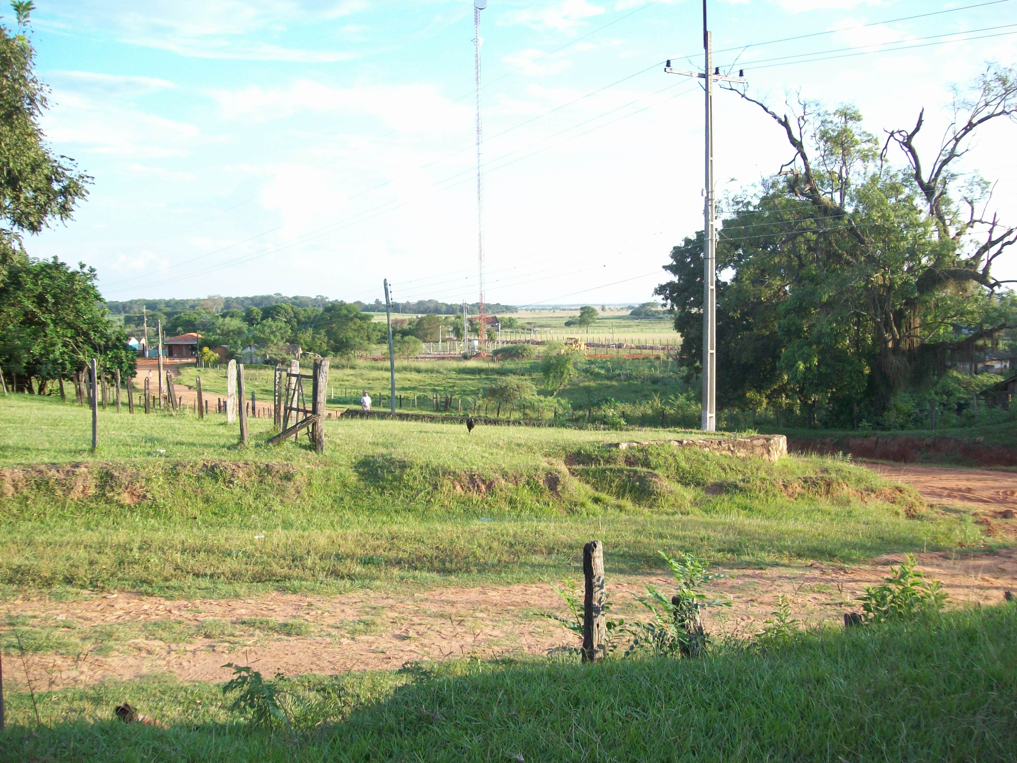 foto de juan de mena